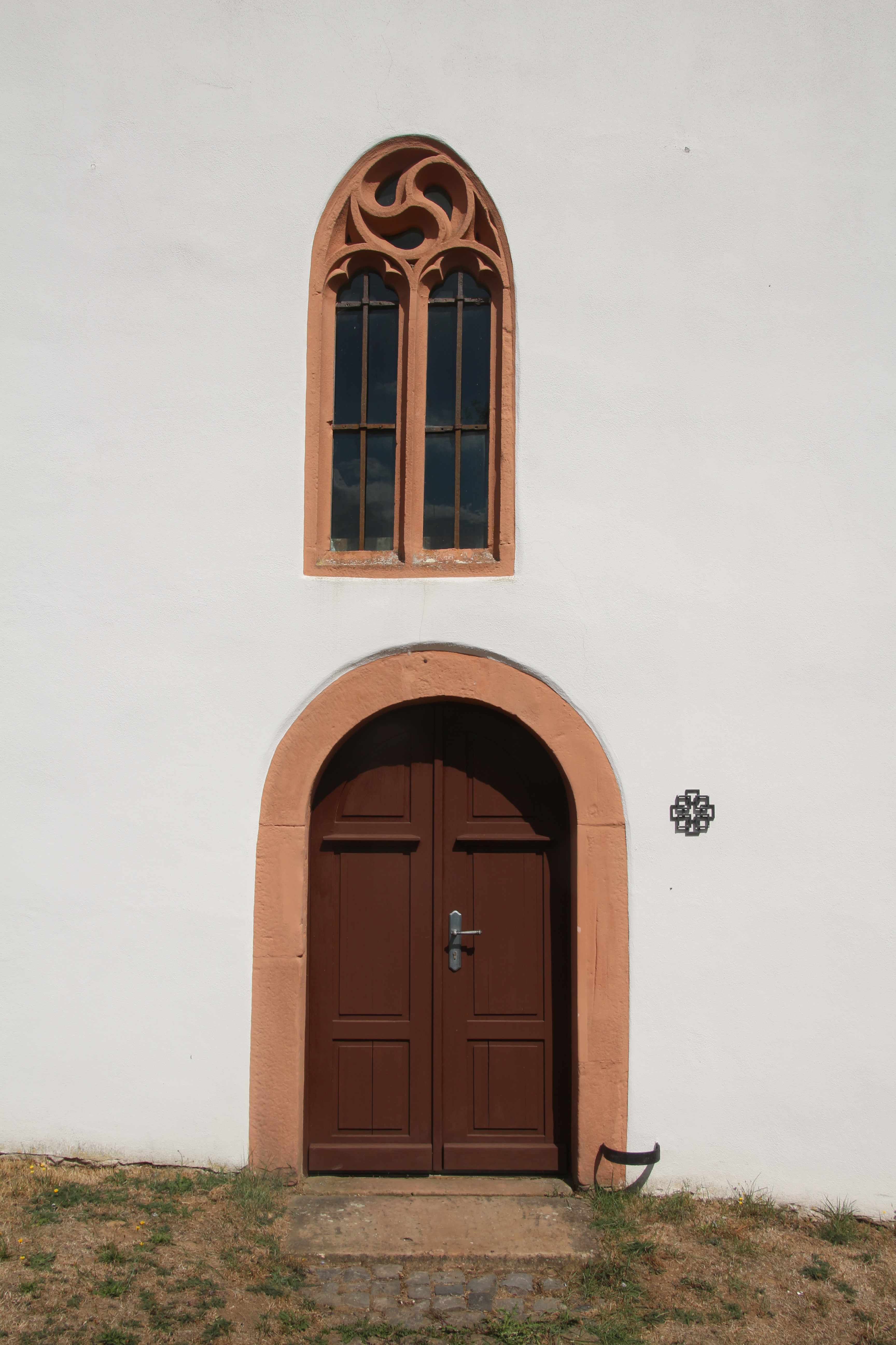 Evangelische Kirche Unter-Lais, Gemeinde Nidda, Wetteraukreis, Hessen